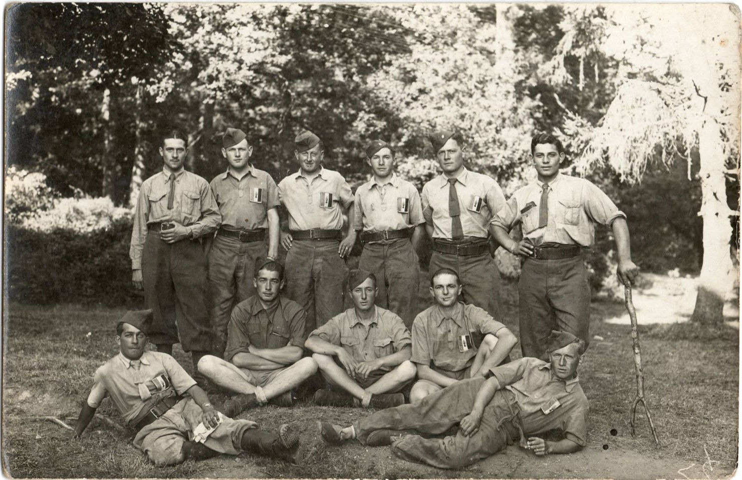 Document familial représentant une partie du 32e RI d'Arministce basé à Veautrompeau (près de Loches) en 1941-42